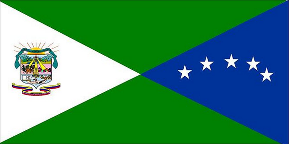 Bandera municipio de antonio romulo costa